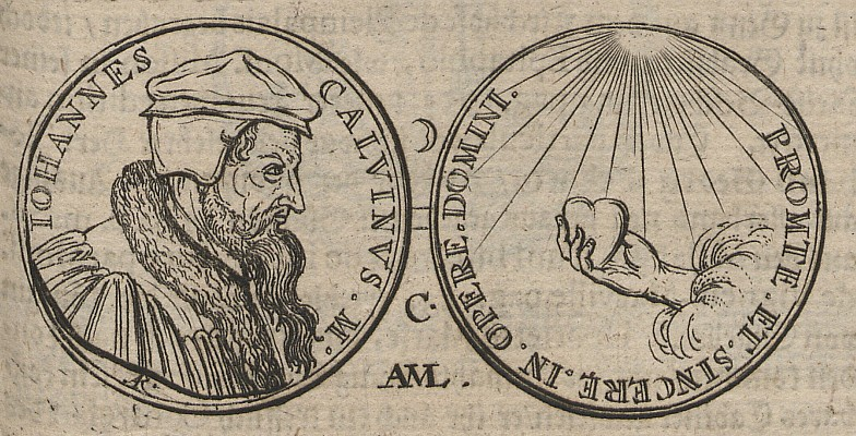 Original image description from the Deutsche FotothekMünze & Gedenkmünze & Schaumünze & Medaille